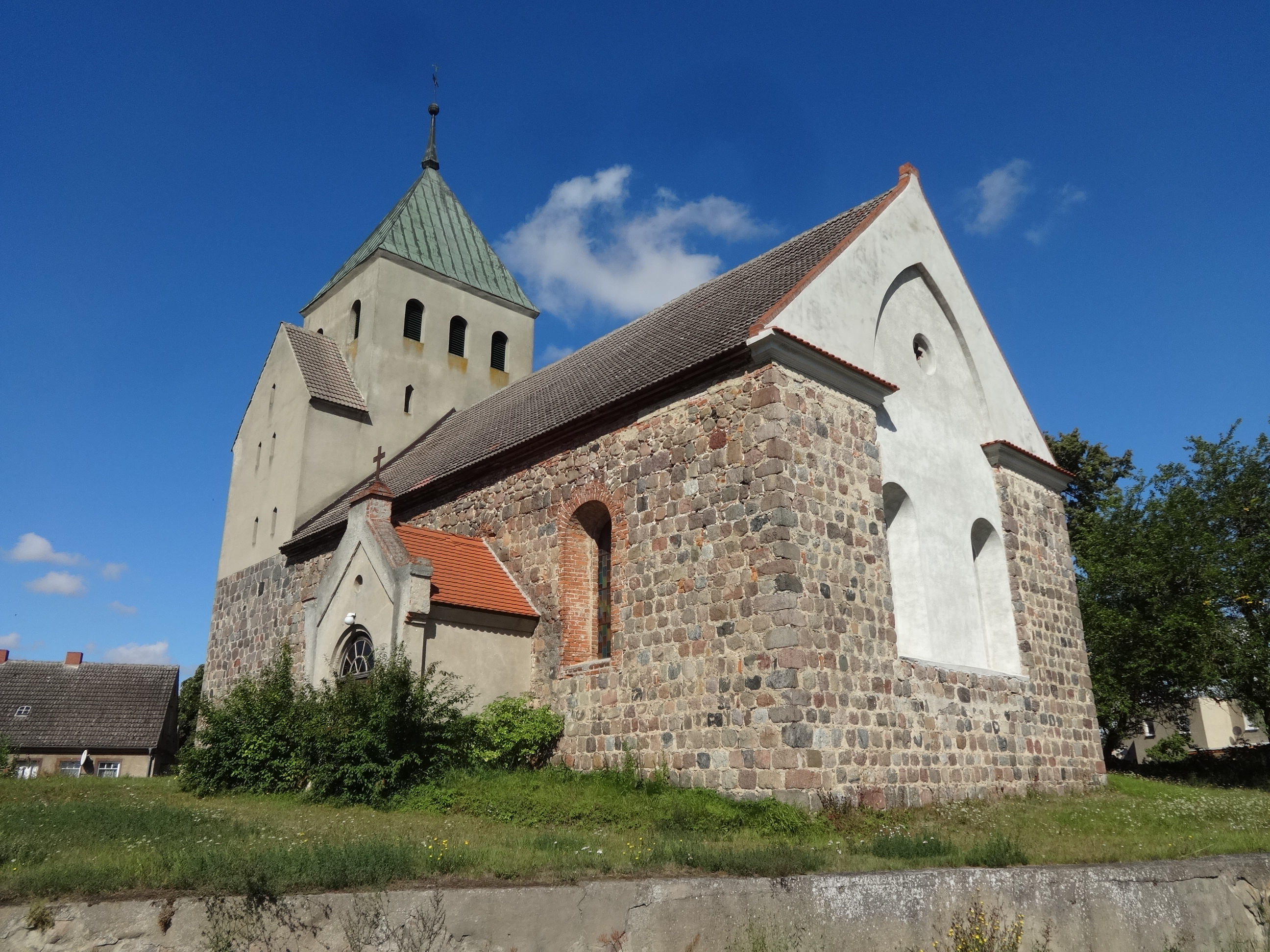 Die Dorfkirche in Haßleben ist eine Saalkirche aus der ersten Hälfte des 13. Jahrhunderts und einer Südvorhalle aus dem Jahr 1887. Im Innern befinden sich eine neugotische Kanzel aus dem Jahr 1887 sowie eine Orgel von Friedrich Hermann Lütkemüller von 1863.